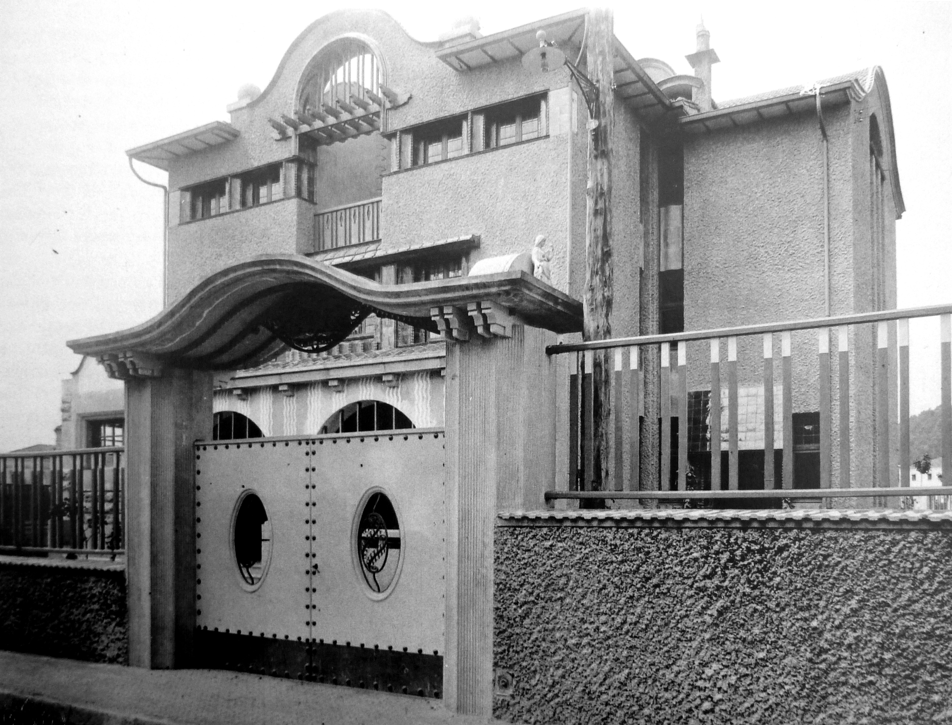 Casa de nova planta